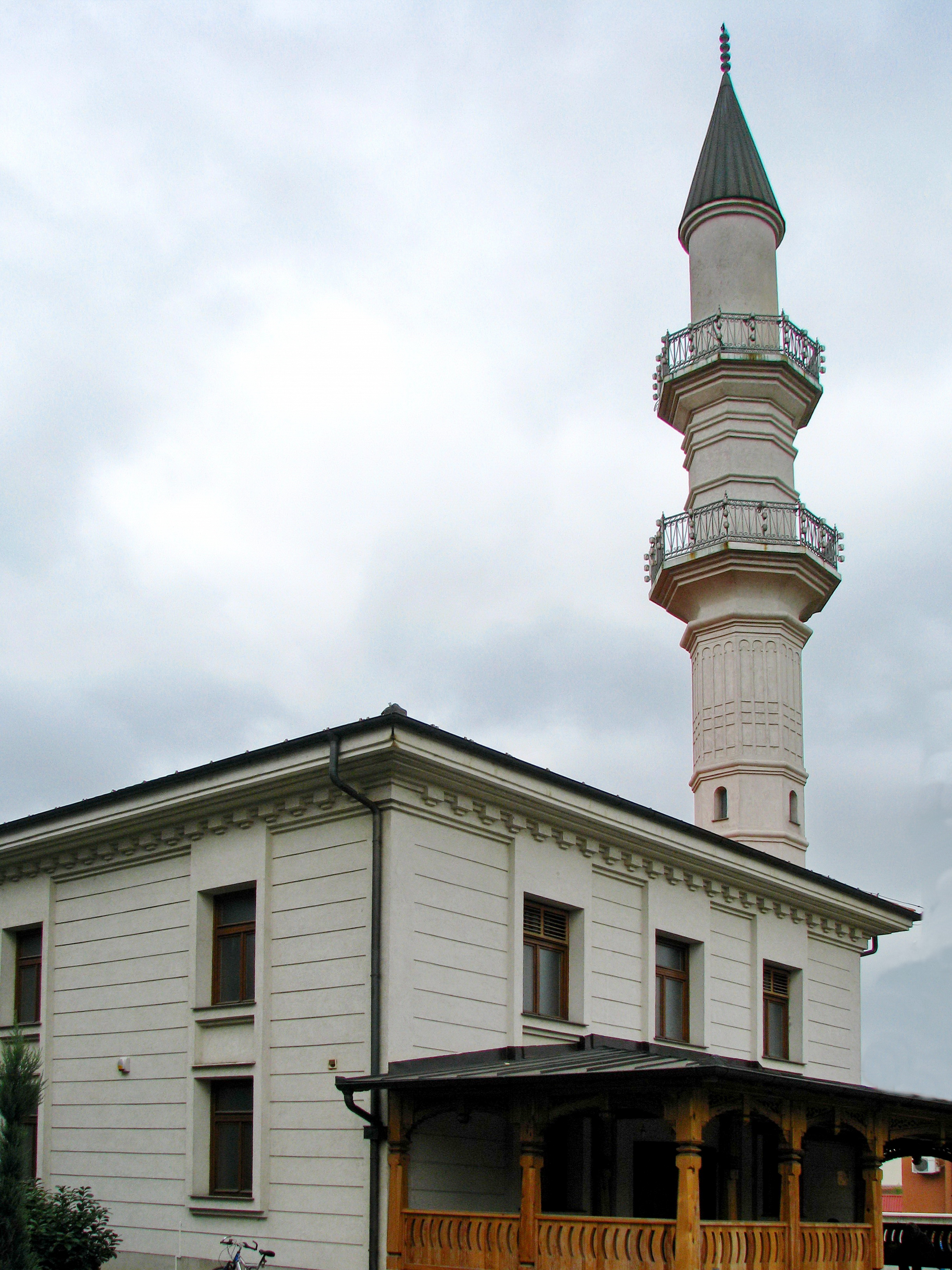 Атик (Стара или Султан Сулејманова) џамија са харемом и турбетом, Бијељина ID добра: NKD208